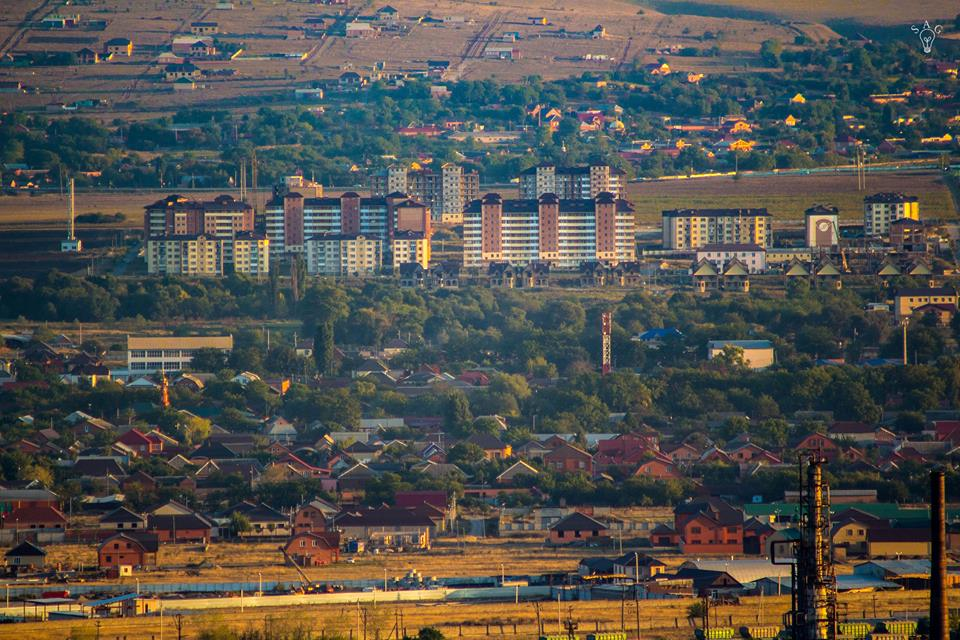 Вид на город Карабулак